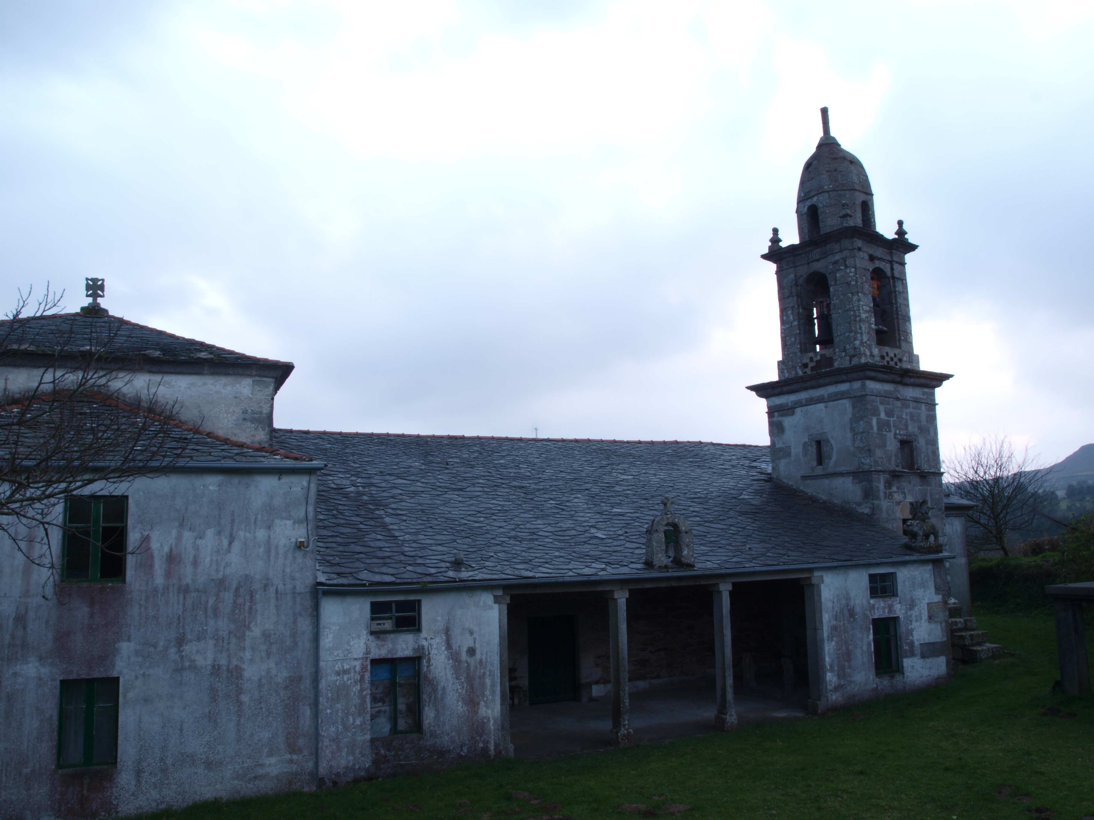 Iglesia de Santa María de Cabanas, en O Vicedo (Provincia de Lugo)